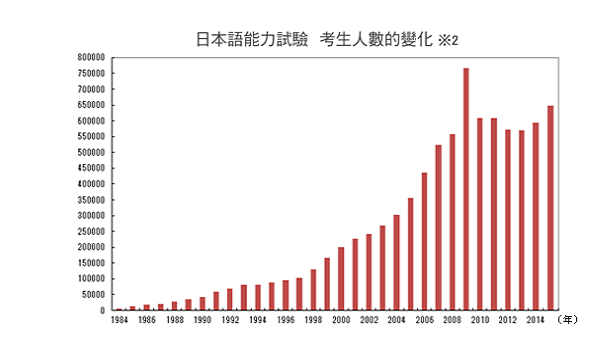 参加日本语能力测试的应试者人数逐年变化情况。